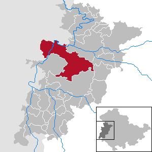 Gerstungen in Thuringia - Wartburgkreis